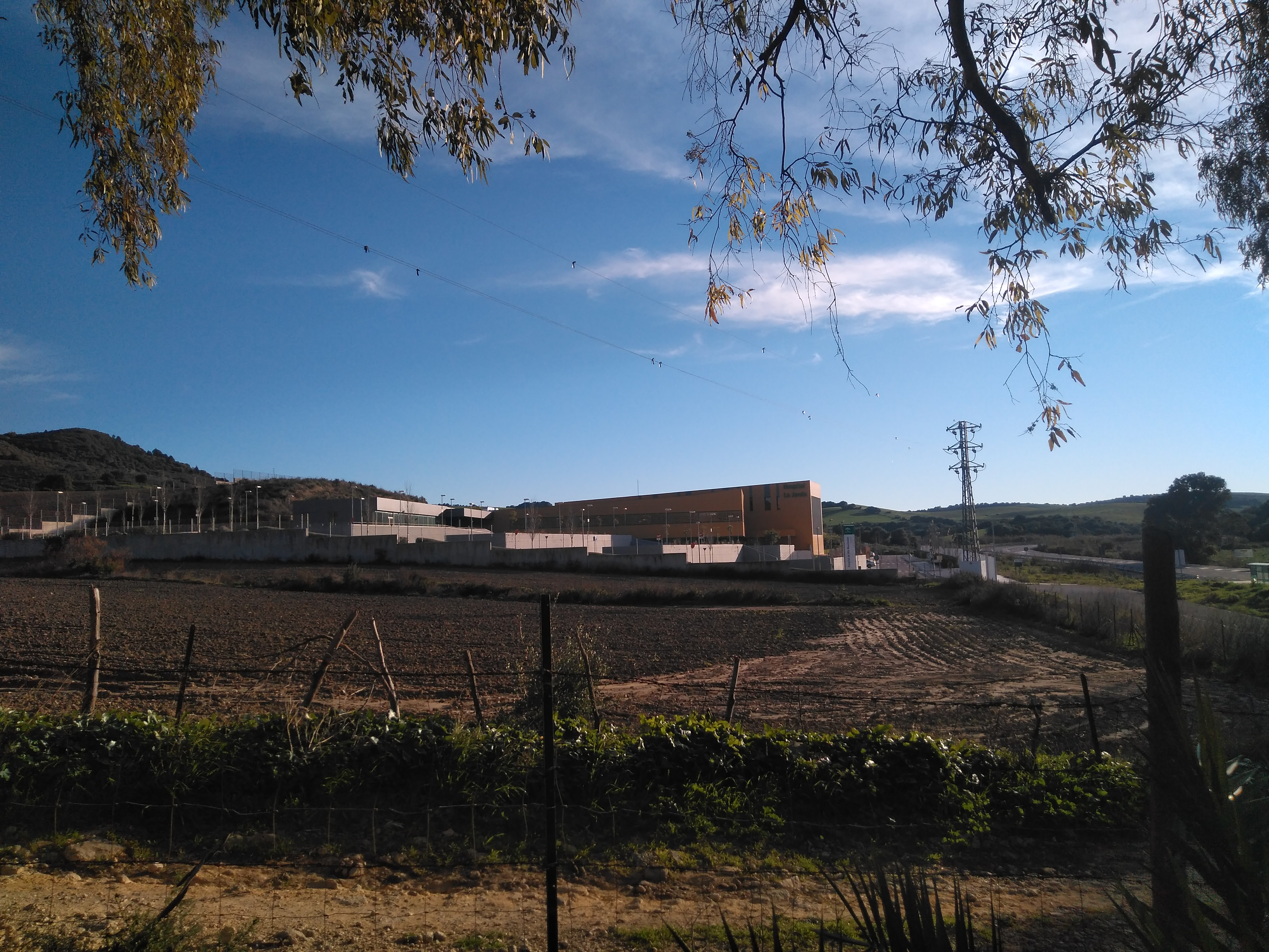 Hospital de Alta Resolución Especializada de La Janda, ubicado en Vejer de la Frontera (España)